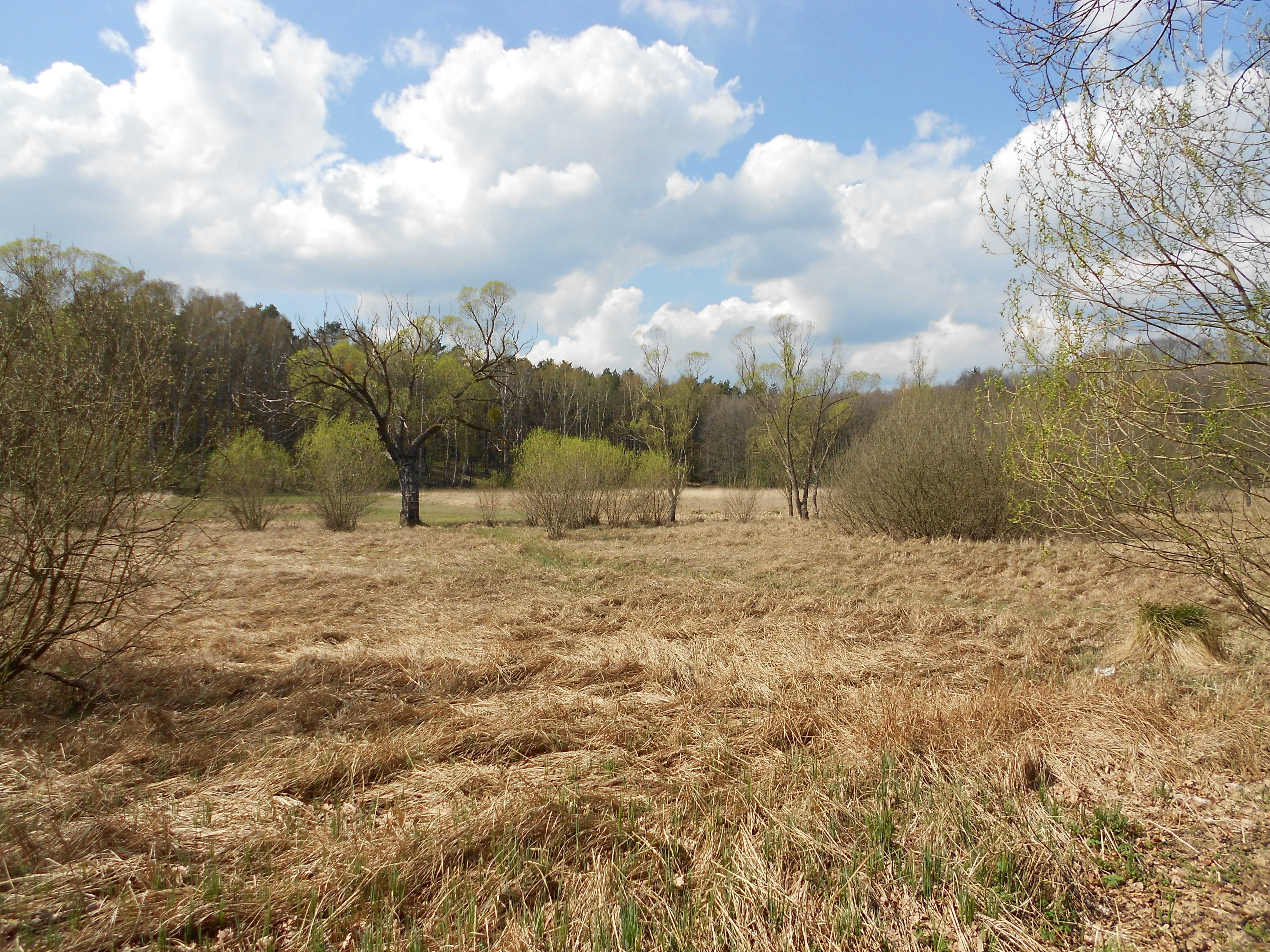 Eberswalde Westend Wildparkstraße Drehnitzwiese